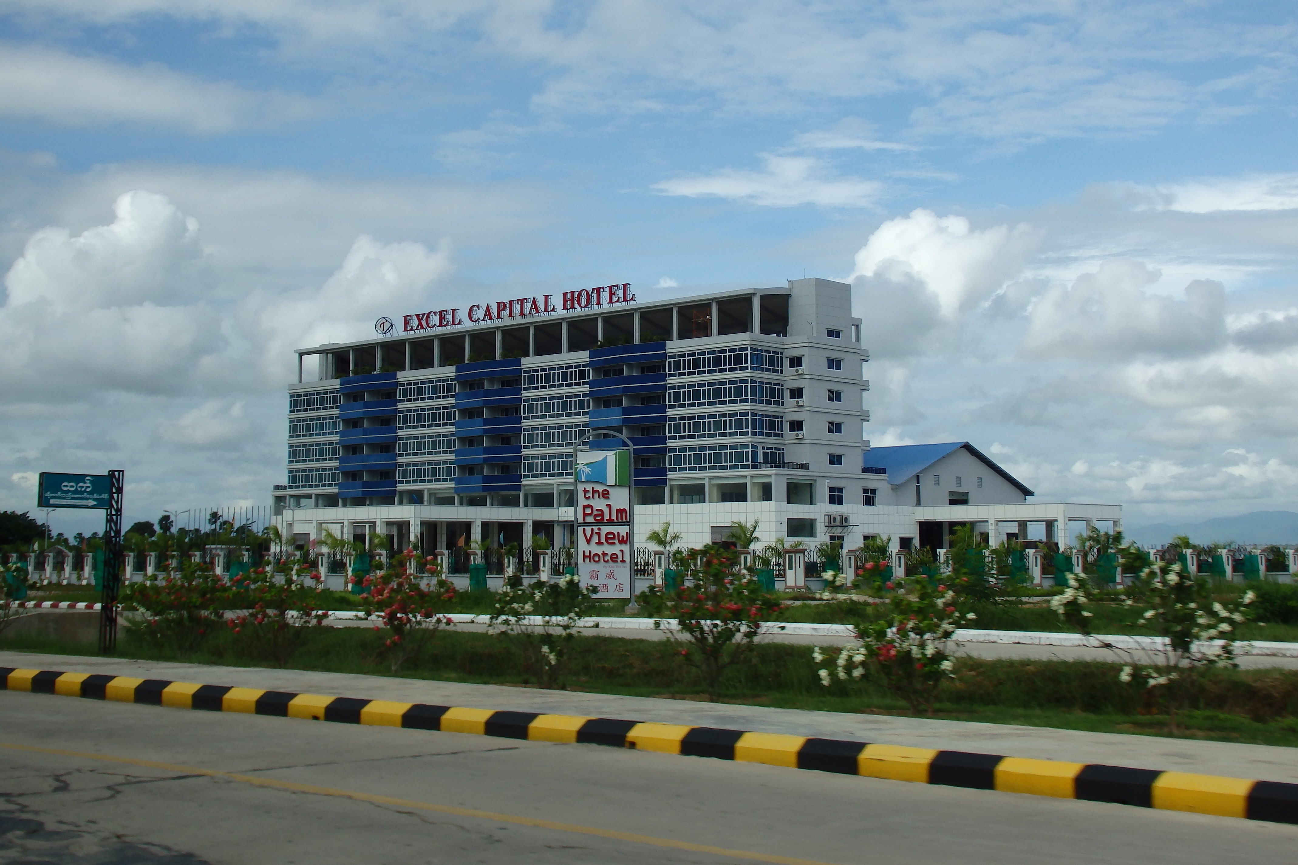 Hotel Zone, Myanmar (Burma)